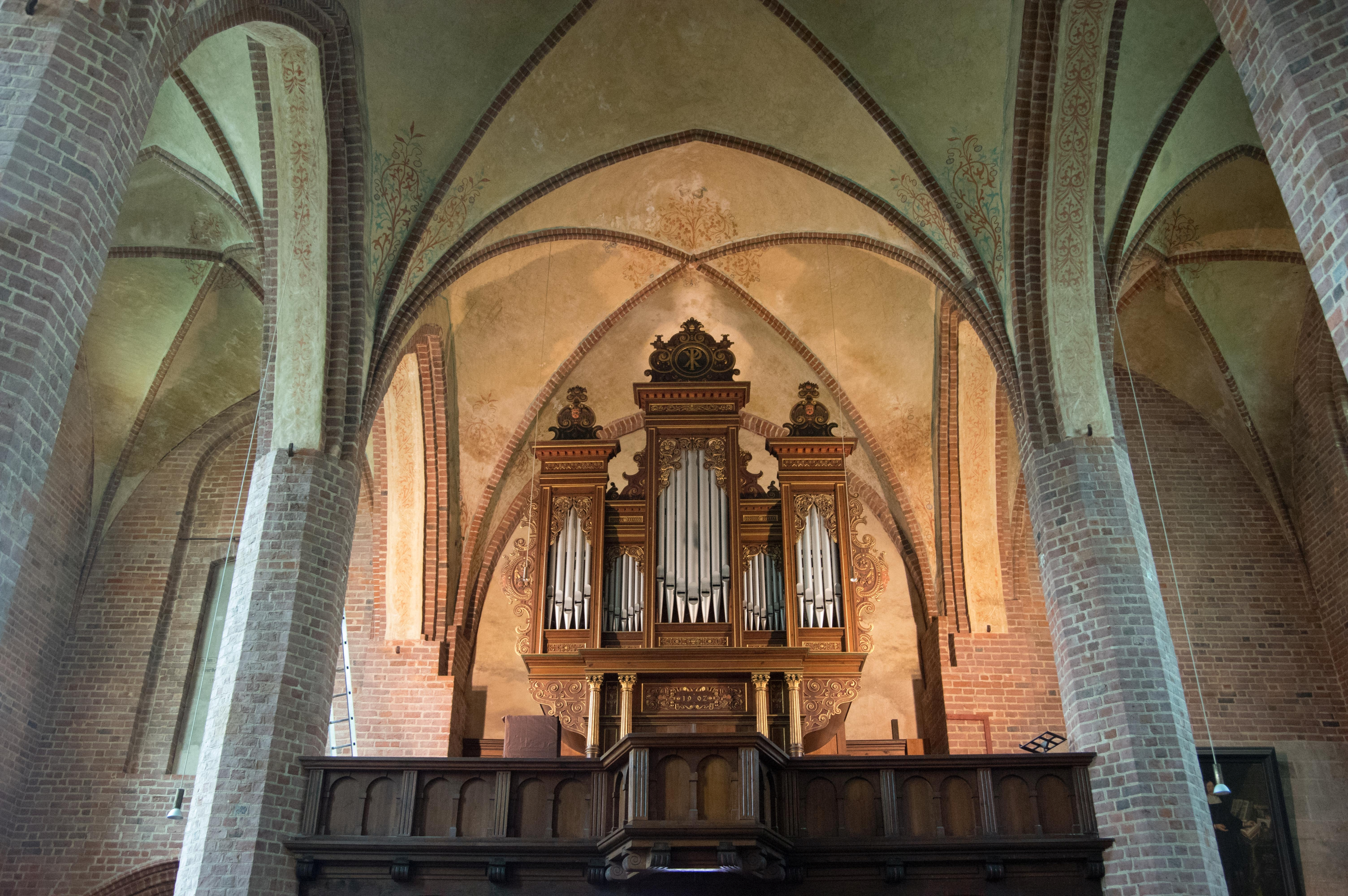 Stendal in Sachsen-Anhalt. Die Jacobikirche steht unter Denkmalschutz.